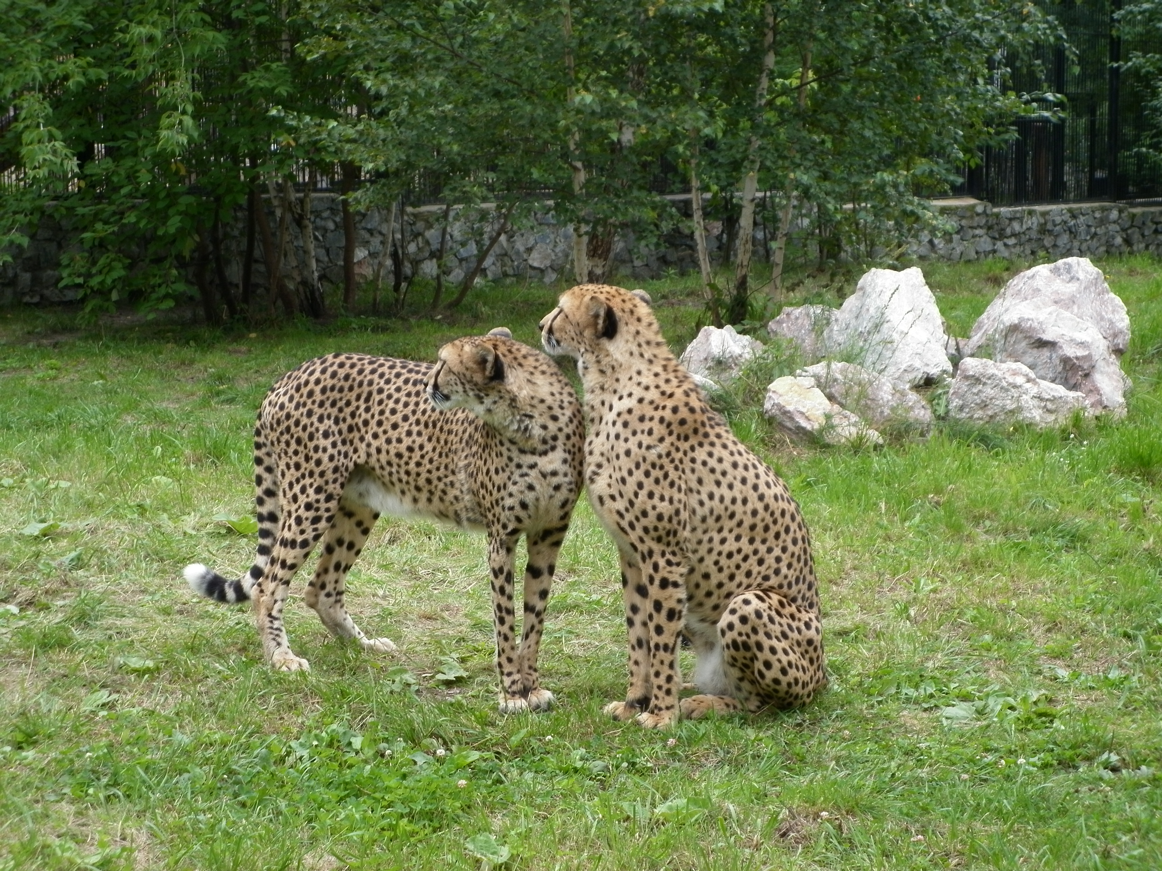 Гепарды в новосибирском зоопарке